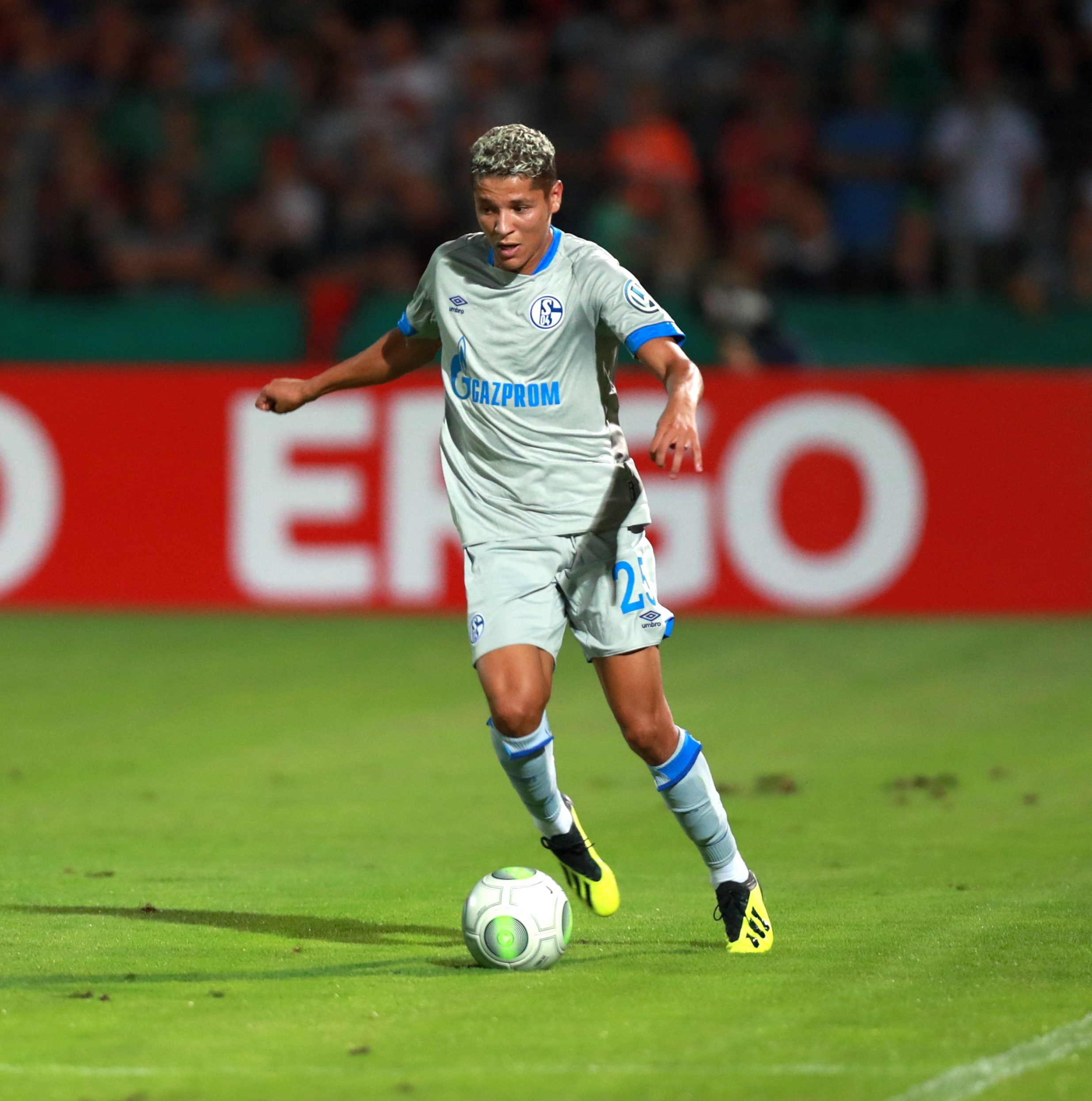 DFB-Pokal 2018/19, 1. Hauptrunde: 1. FC Schweinfurt 05 gegen FC Schalke 04 0:2 (0:1)